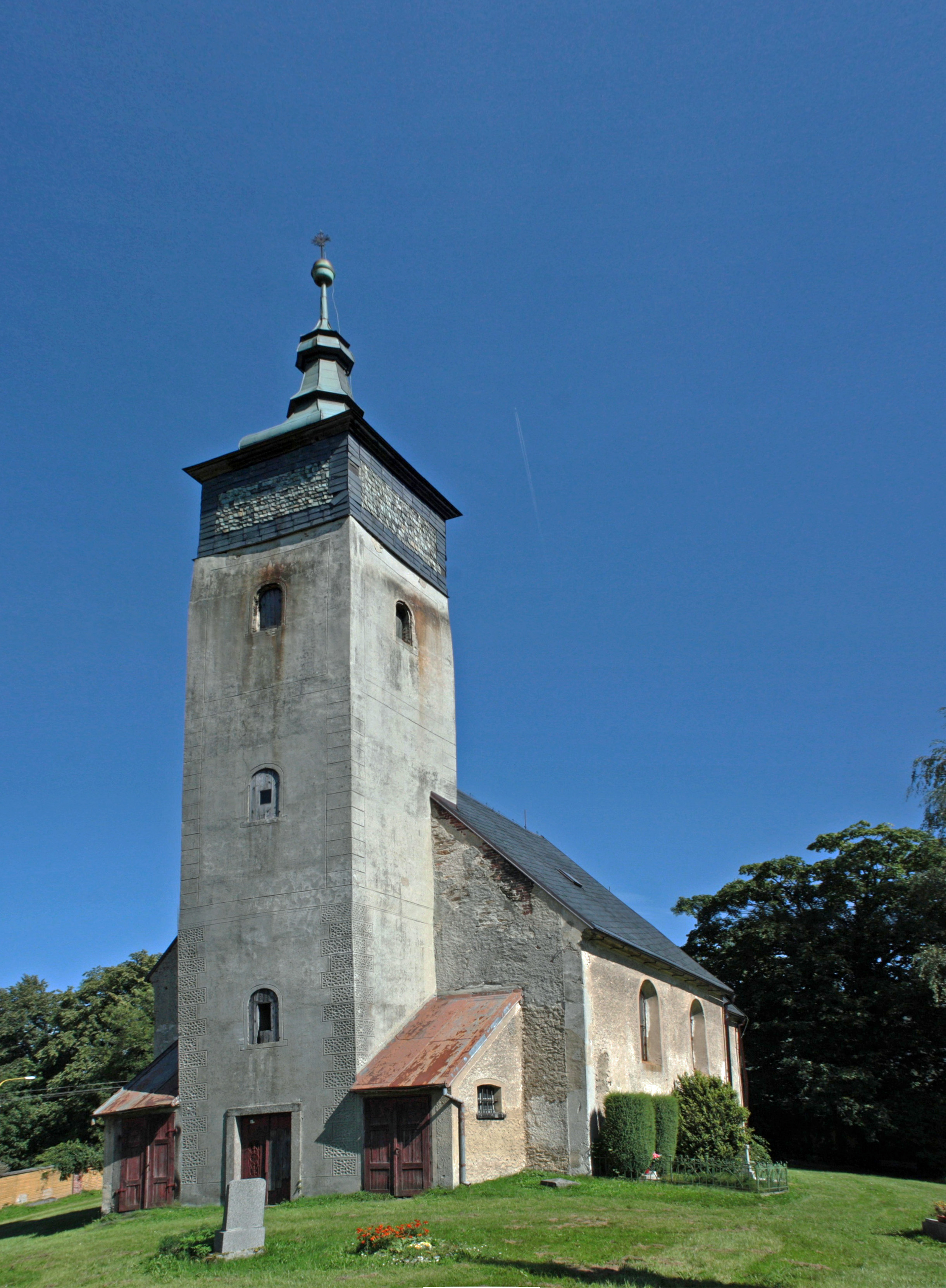 This photograph was taken with a DSLR from WMCZ's Camera grant. Kostel svatých Petra a Pavla v Ludvíkově pod Smrkem (pohled od jihozápadu).